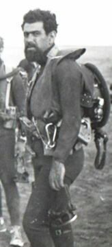 שאול סלע לפני צלילה 1965